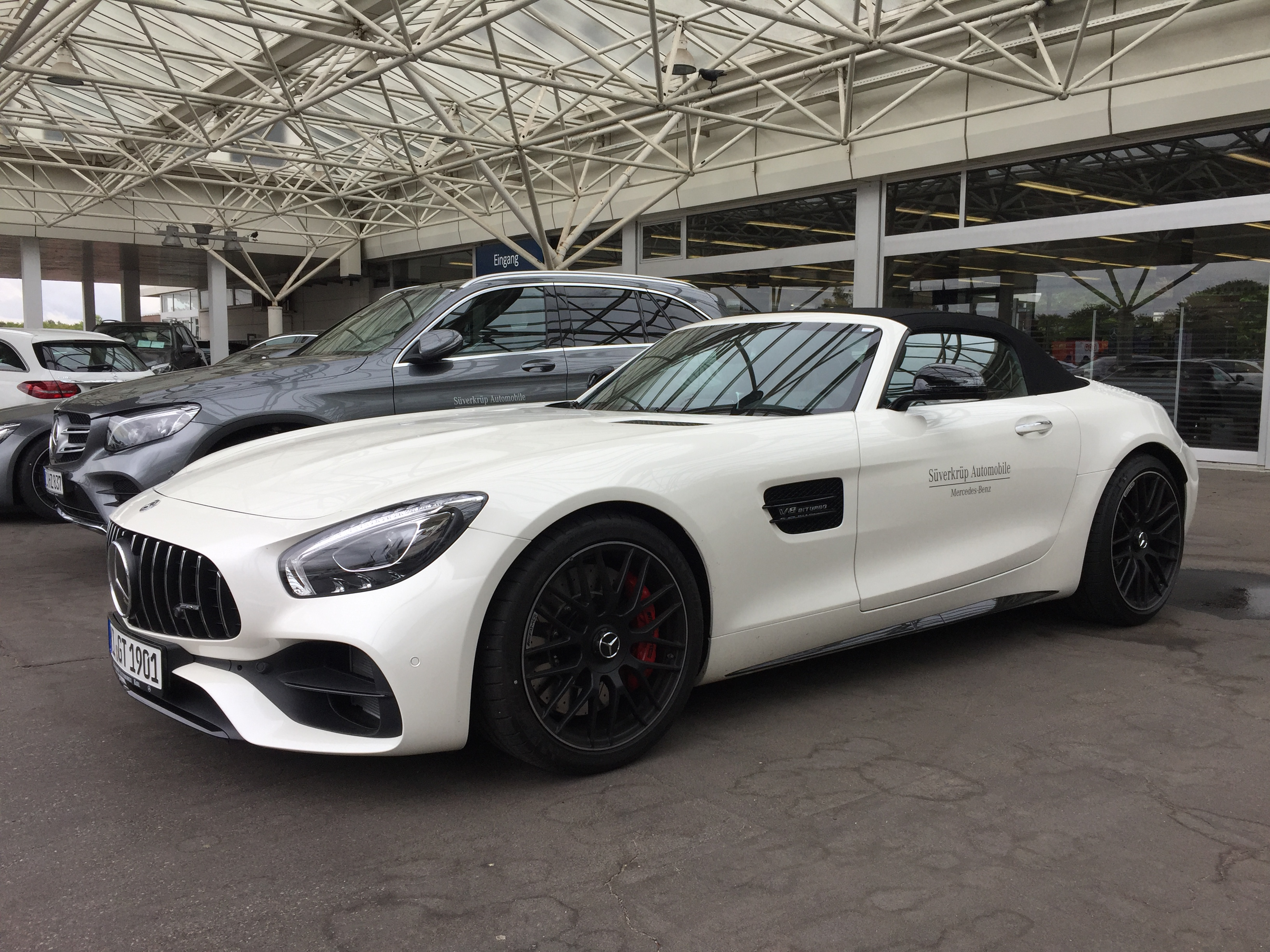 Mercedes AMG GT-C Roadster Seitenansicht